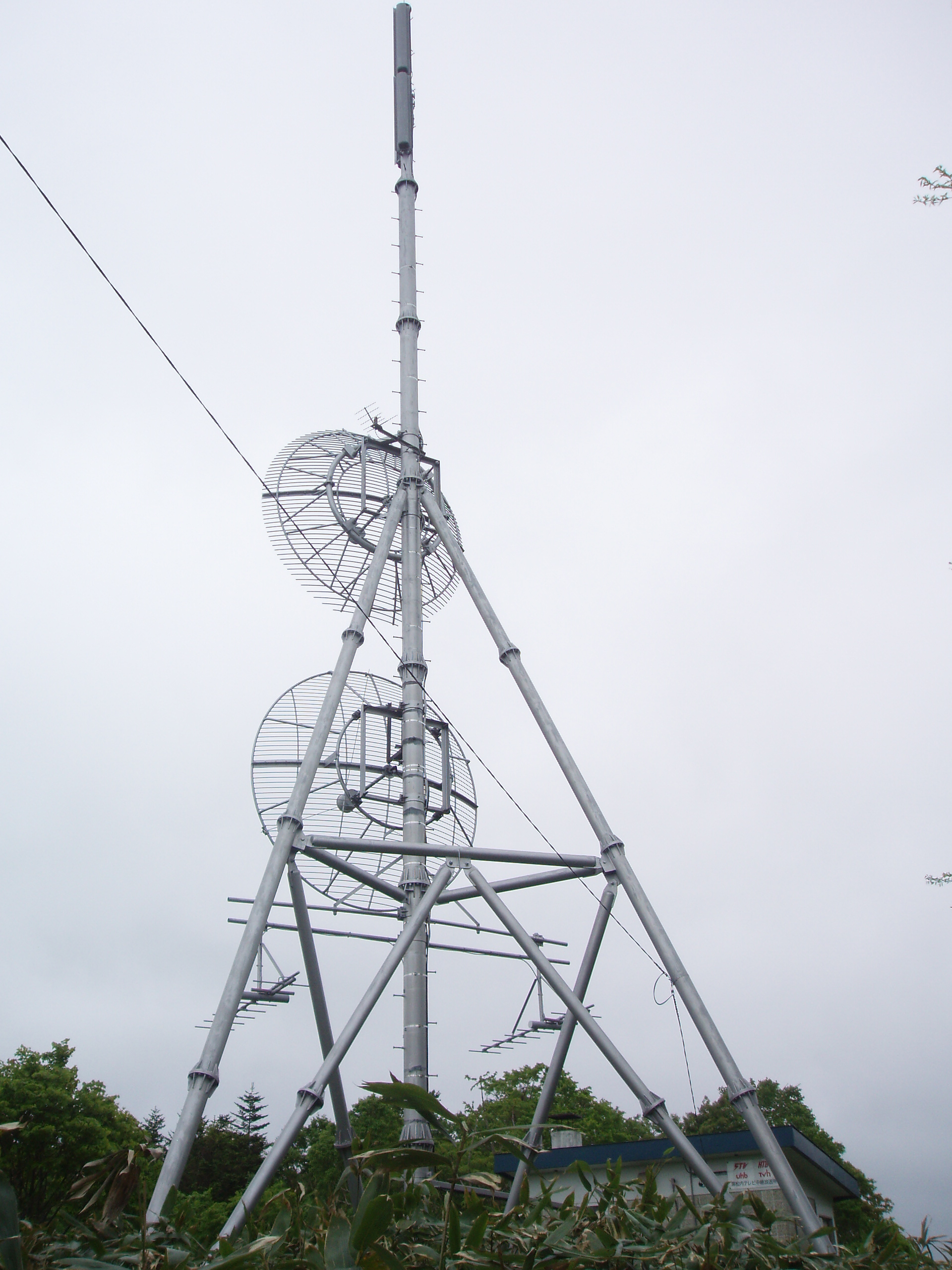 黒松内中継局 STV・HTB・UHB・TVh送信設備